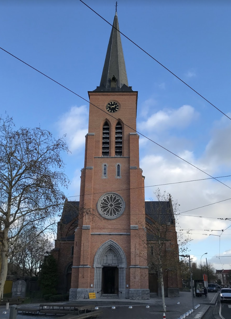 Eglise